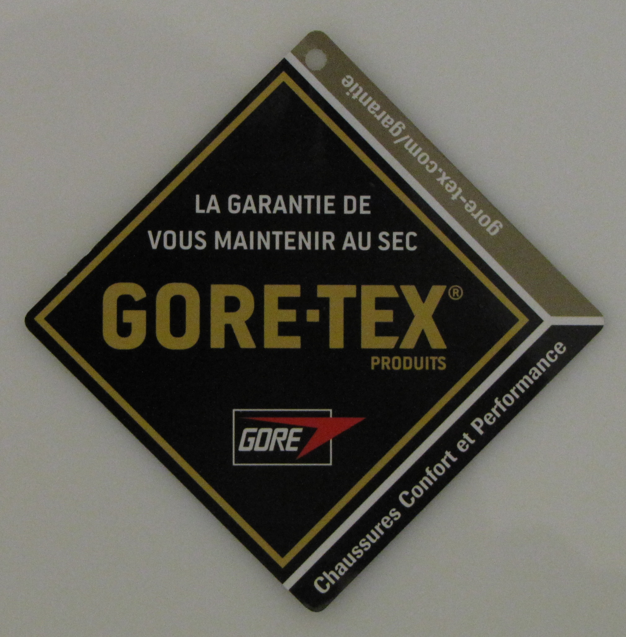 Le logo du produit de Gore-Tex.